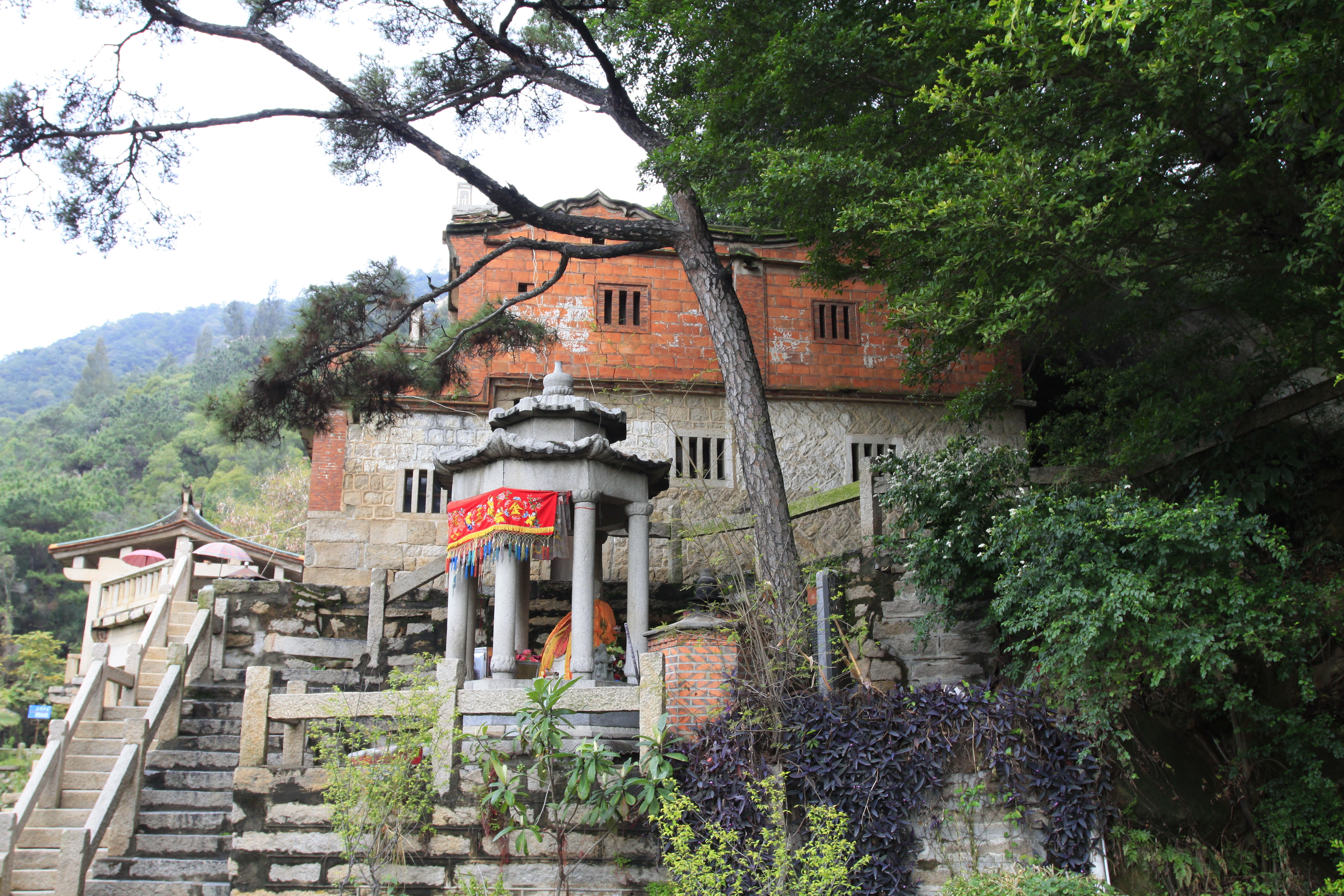 草庵，位于中国福建省晋江市，是全国重点文物保护单位。